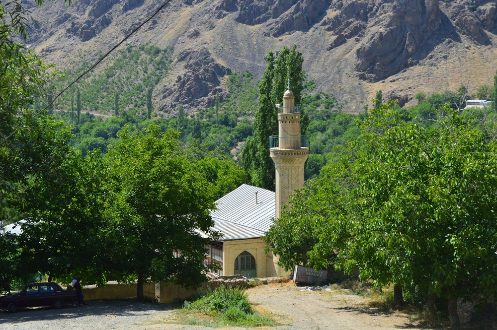 Ordubad rayonu Nüsnüs kəndi Nüsnüs piri